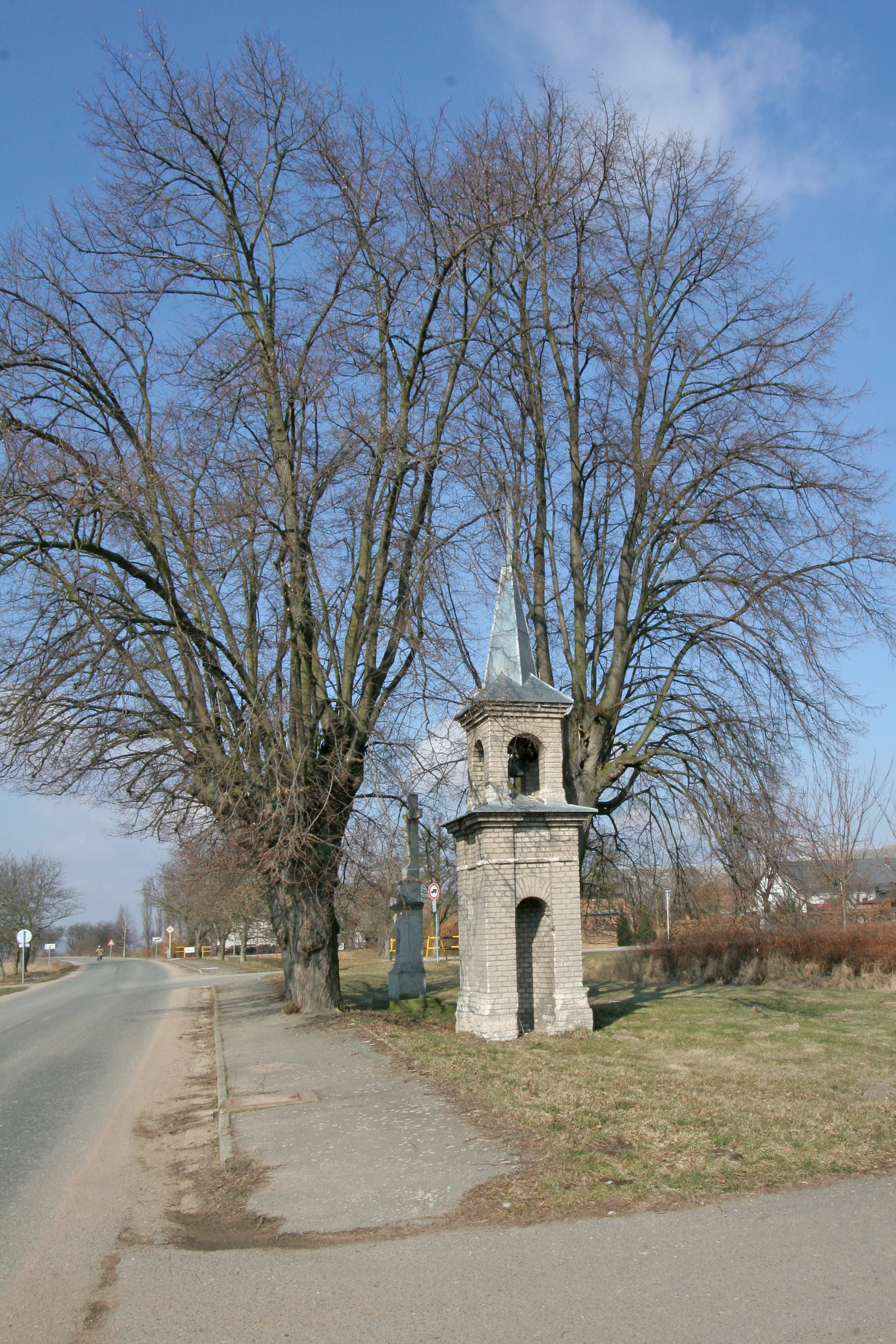 Urbanice zvonička